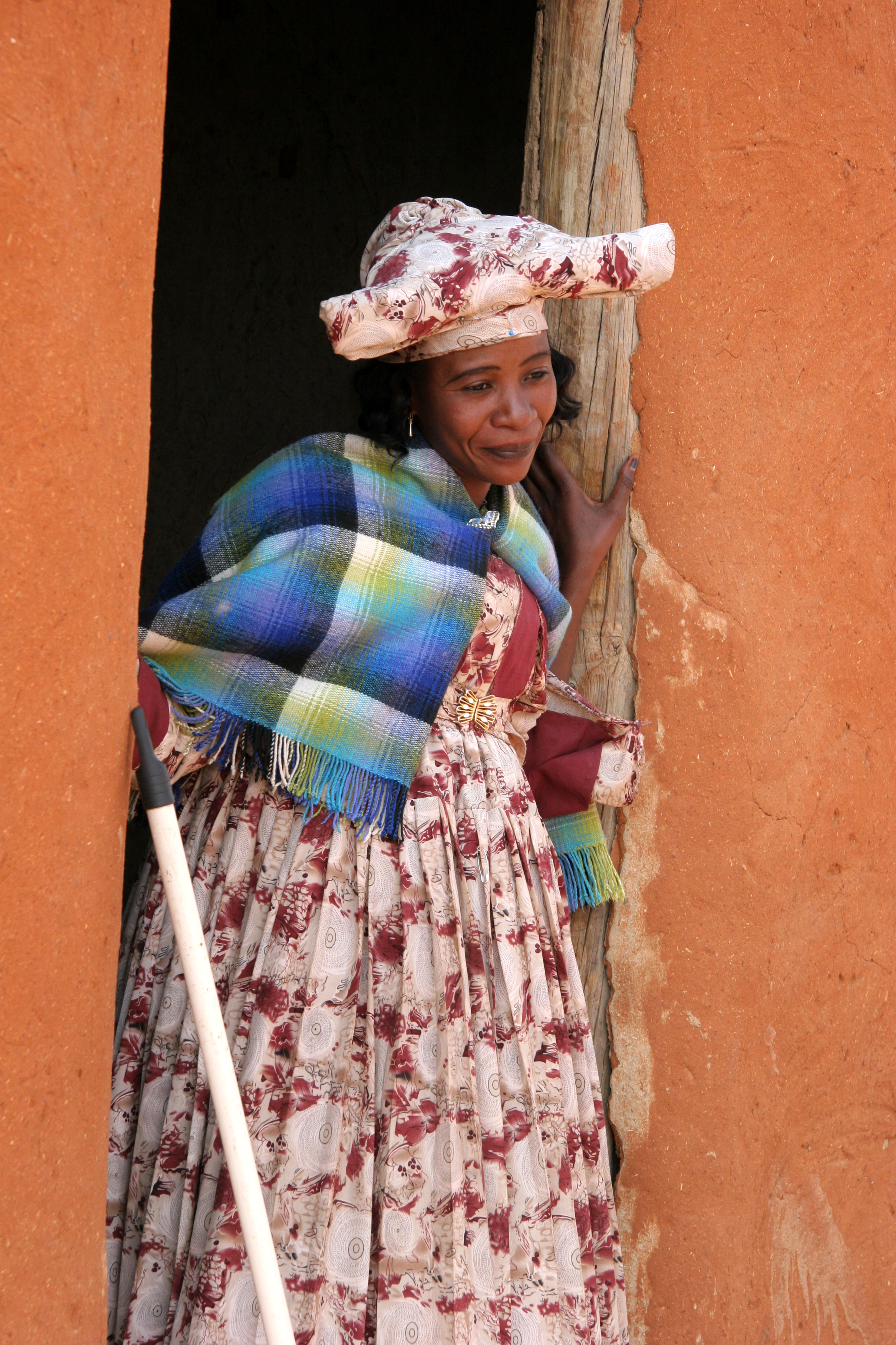 namibie femme herero devant sa case